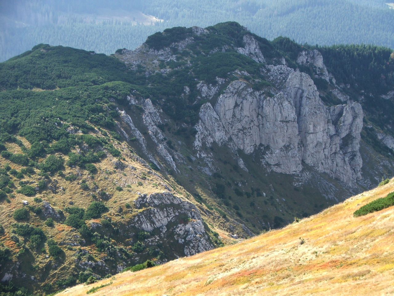 Tomanowy Grzbiet